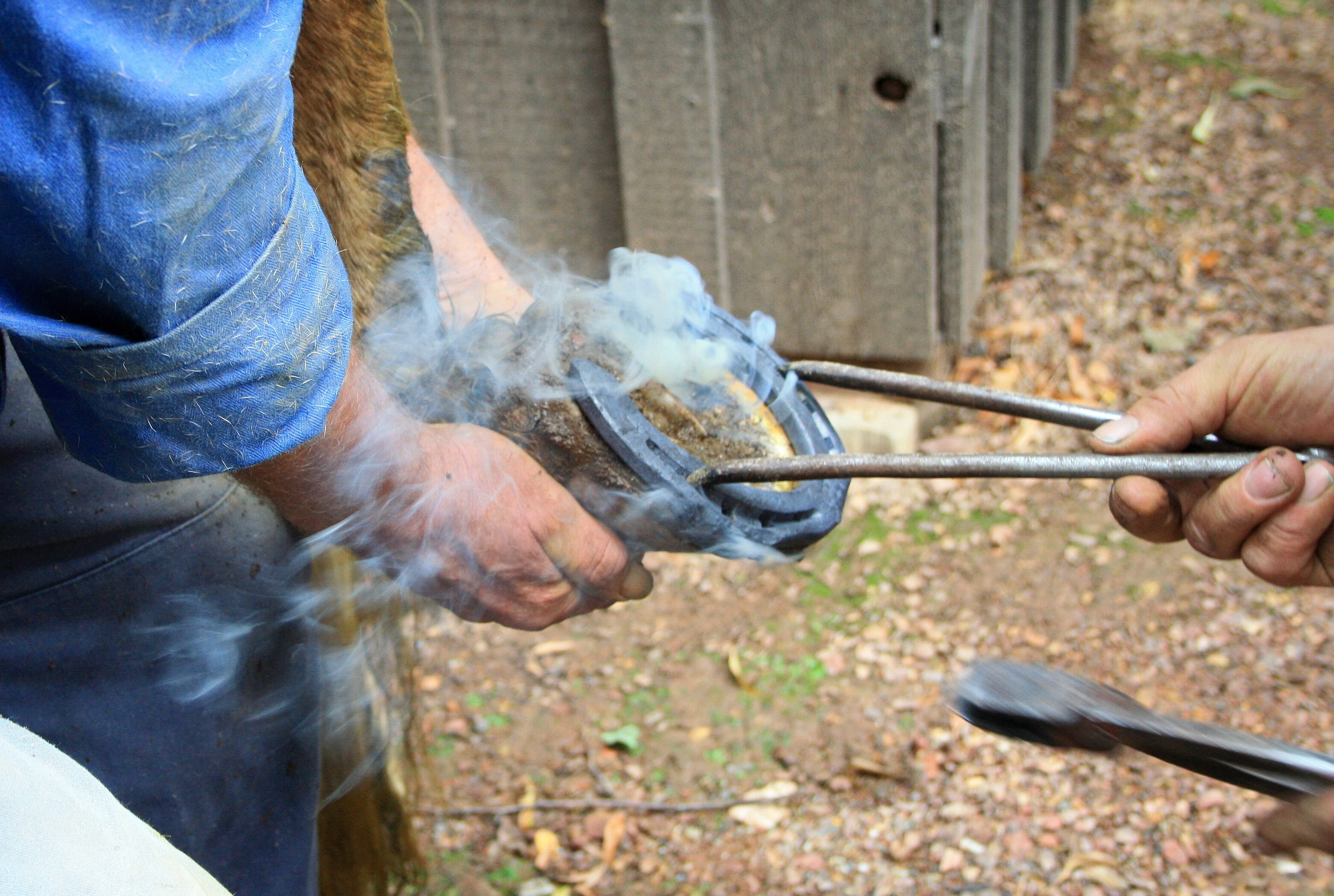 Hufeisen. Aufgenommen in Sachsen.